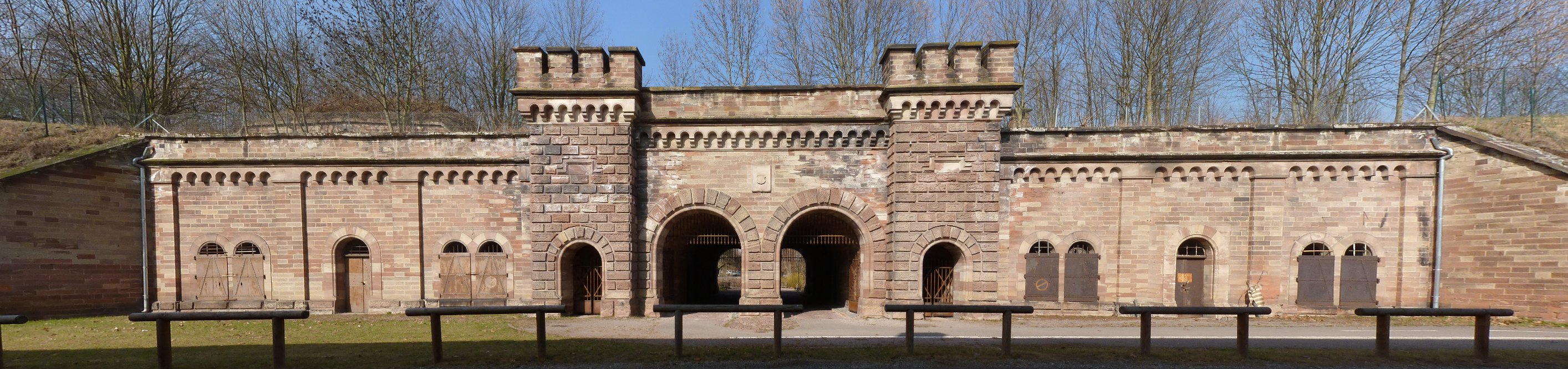 Befestigung in Straßburg, die Kriegstor genannt wird, „rue du rempart“ (inter dem Hauptbahnhof). Sie wird in der 19. Jahrhundert gebaut.